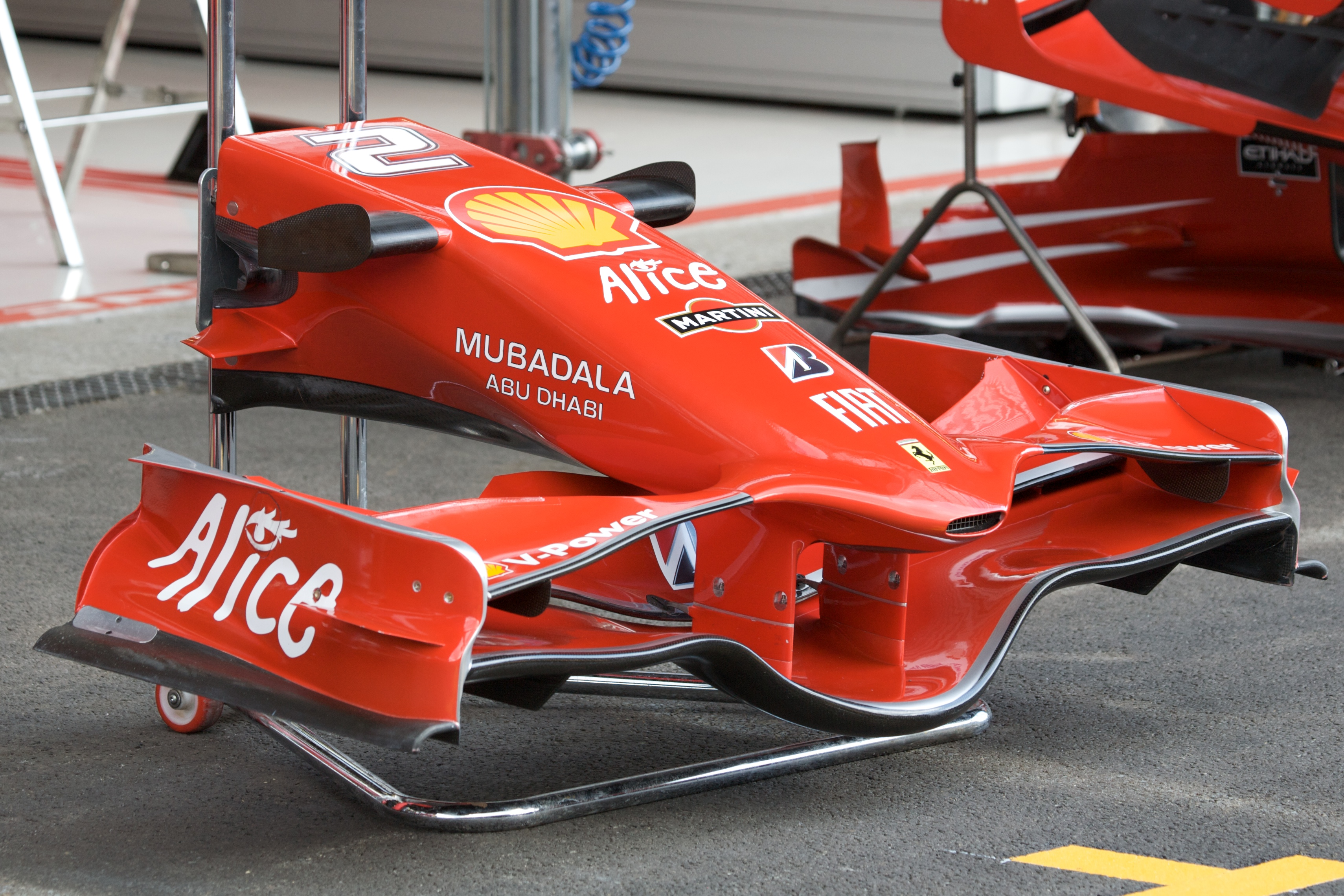 Alerón delantero del Ferrari F2008, Spa